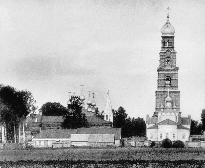 "Городецкий в честь Феодоровской иконы Божией Матери мон-рь. Фотография. Нач. XX в. (ГИМ)